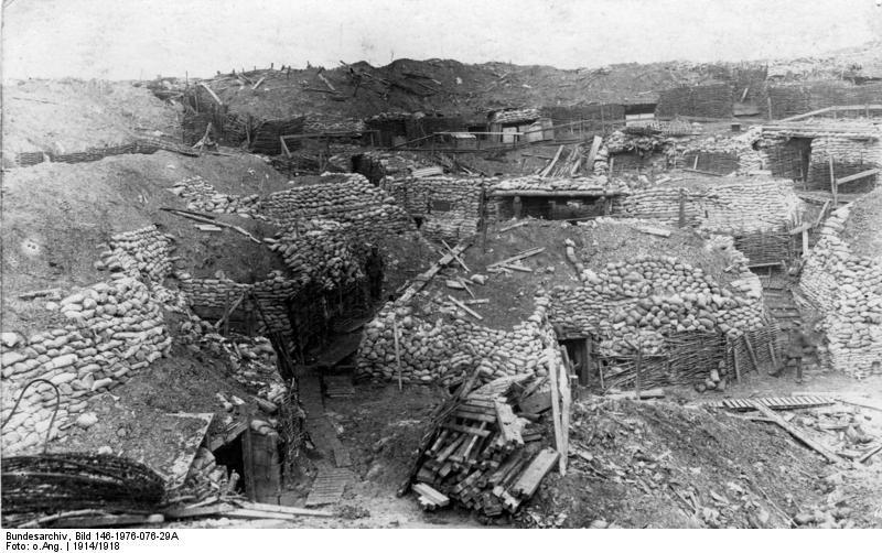 ausgebauter Sprengtrichter Wilhelm Maier, Wilhelm / Gefreiter / I. R. 121 / geb. 2.10.92 in Benningen